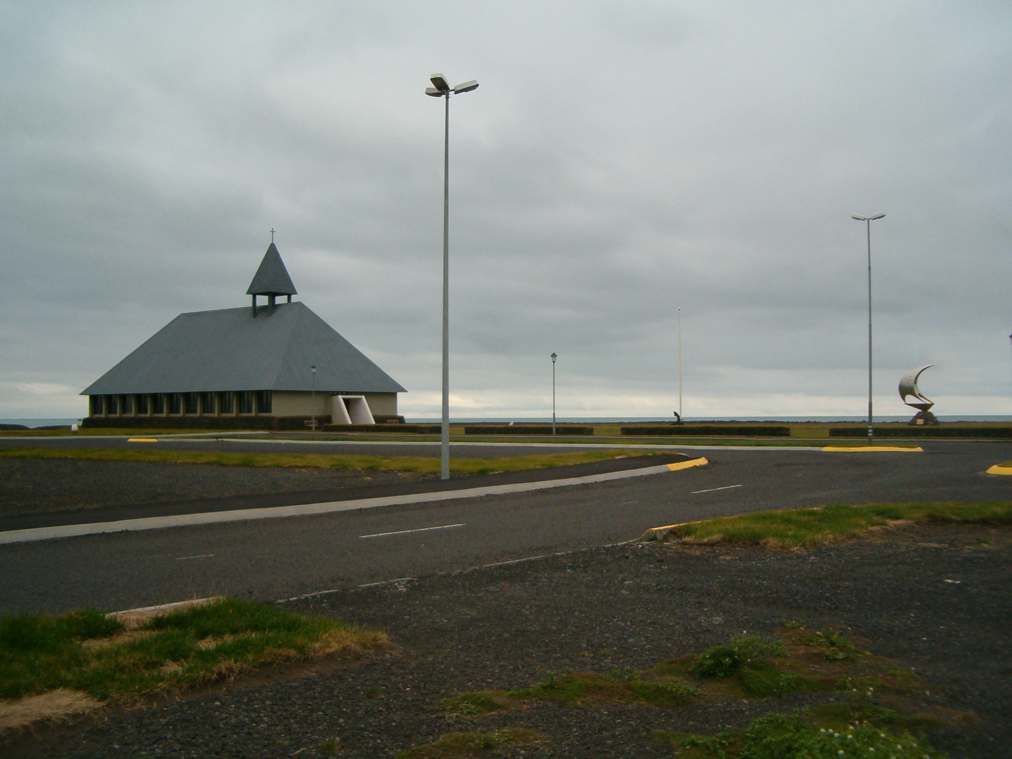 Þorlákshafnarkirkja er í Þorlákshafnarprestakalli í Árnesprófastsdæmi. Þorlákskirkja var vígð 1982